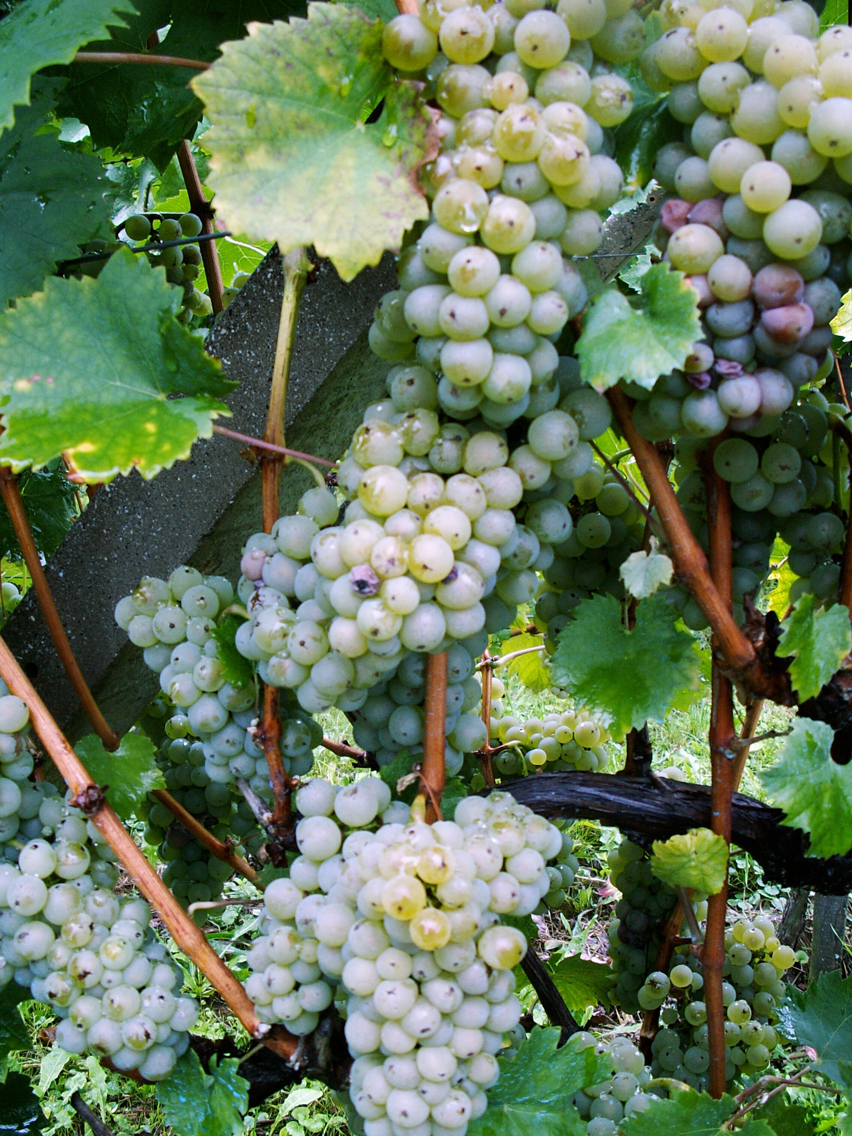 Grozdje rdeče kraljevine